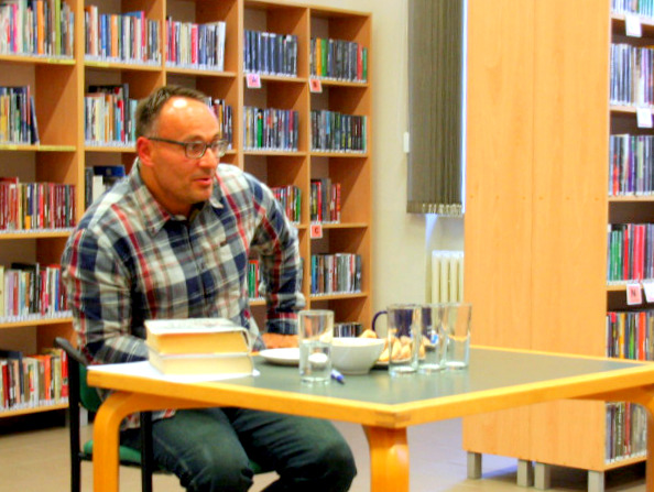 Robert Sklář na besedě v michálkovické pobočce Knihovny města Ostravy